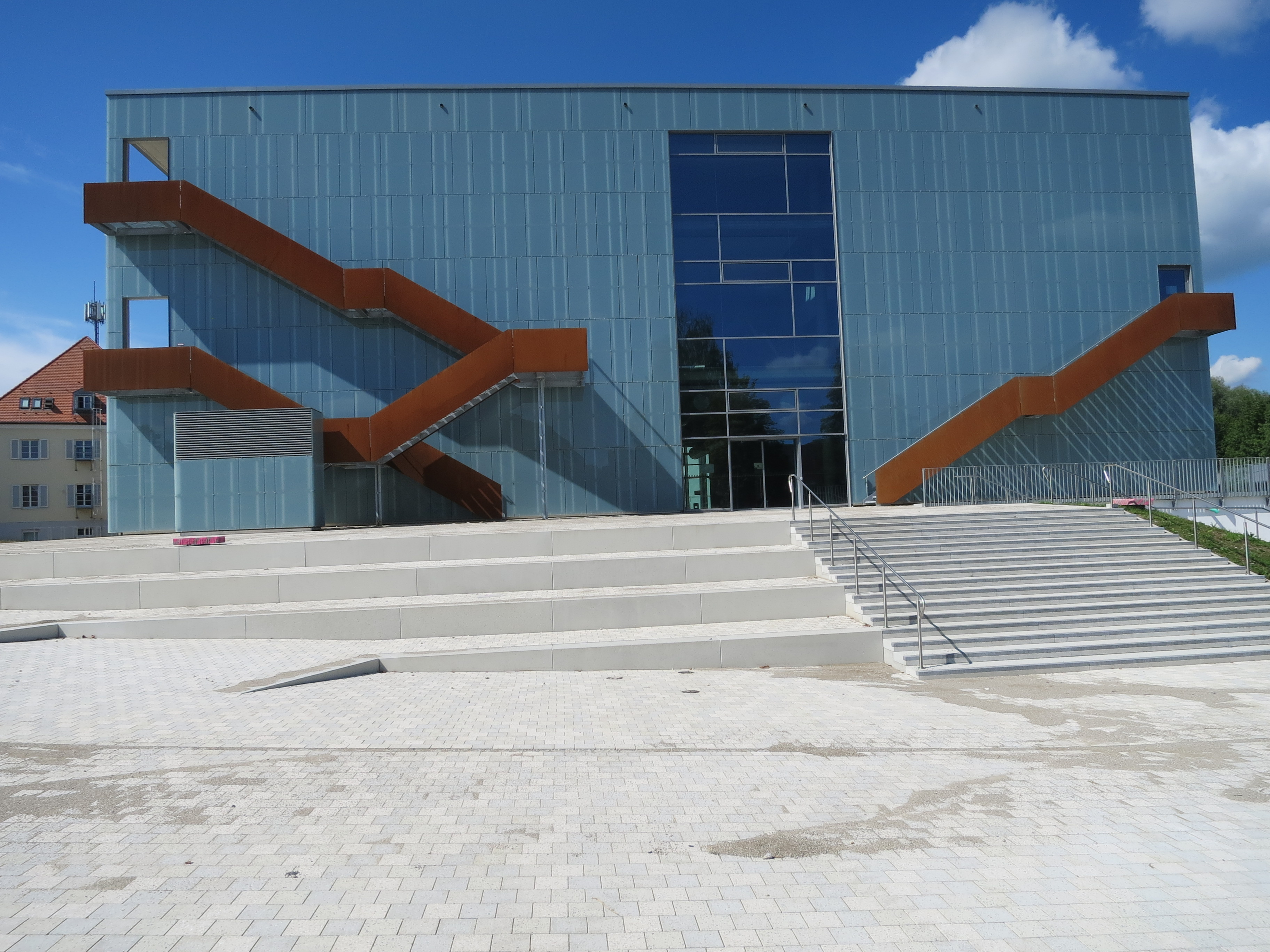 Dieses wichtige Gebäude der HSWT wurde im Herbst 2017 endgültig fertig